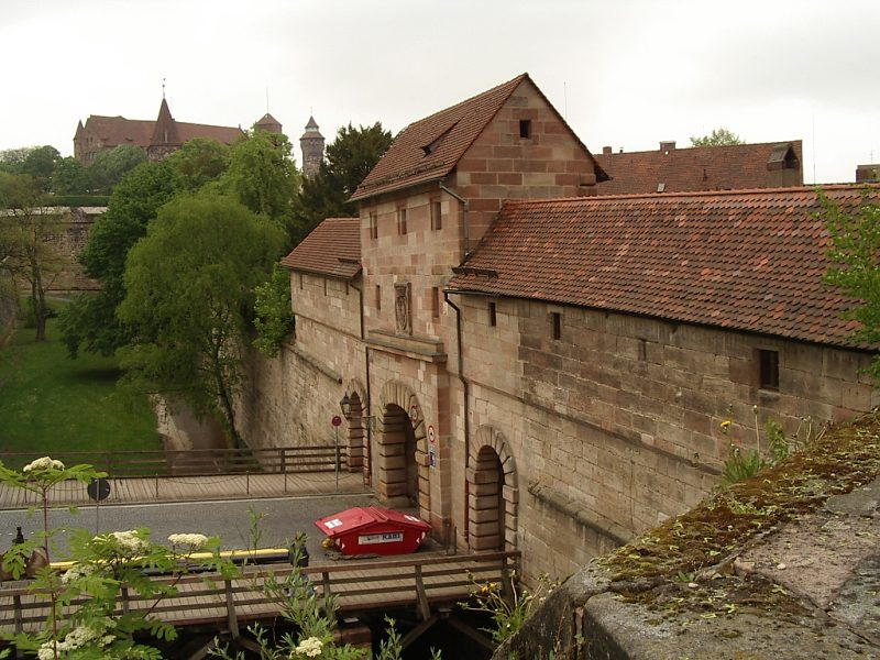 Beschreibung Nürnberg, Stadtmauer, Neutor außen, v. SSW (2004-05-11). Quelle Fotographie 2004-05-11 Fotograph --Keichwa Copyright Status GNU Freie Dokumentationslizenz Vgl. Bild:Nuernberg stadtmauer neutorbastei aussenmauer v s.jpg Von der Neutorbastei aus gesehen. Auf der Brücke, die über den Graben führt, steht ein roter Bauschuttcontainer. Im Hintergrund die Nürnberger Burg mit dem Sinwellturm (rechts).